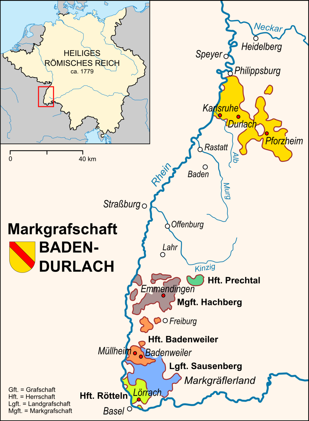 Karte der Markgrafschaft Baden-Durlach mit allen Territorien von 1535 bis 1771